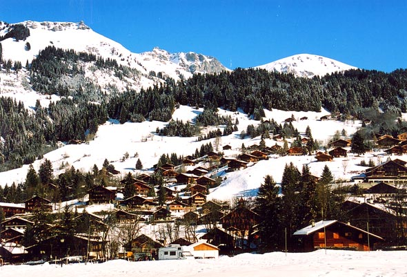 Les Diablerets